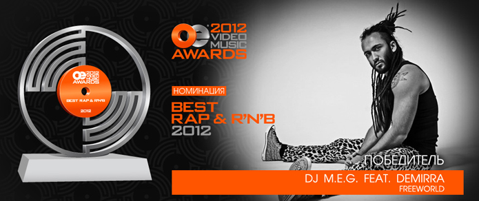 Номинация BEST RAP AND R'N'B